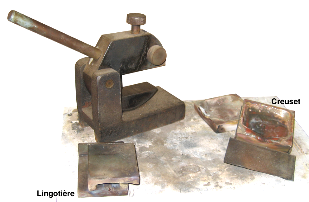 lingotière à bascule, lingotière, creusets source : l'Or de Vaise photo Dominique grassigli